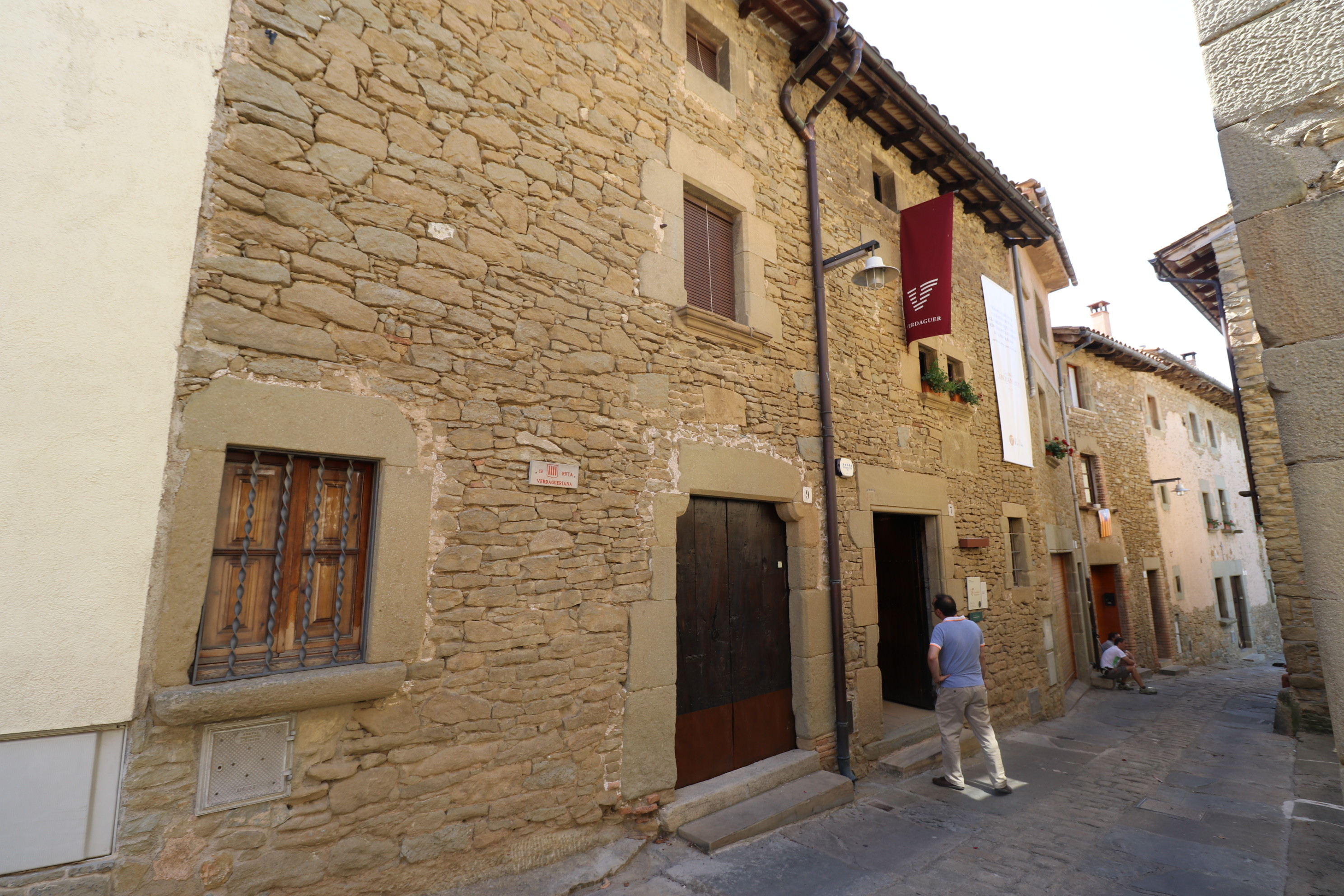 Façana de la casa Museu Verdaguer (Folgueroles)